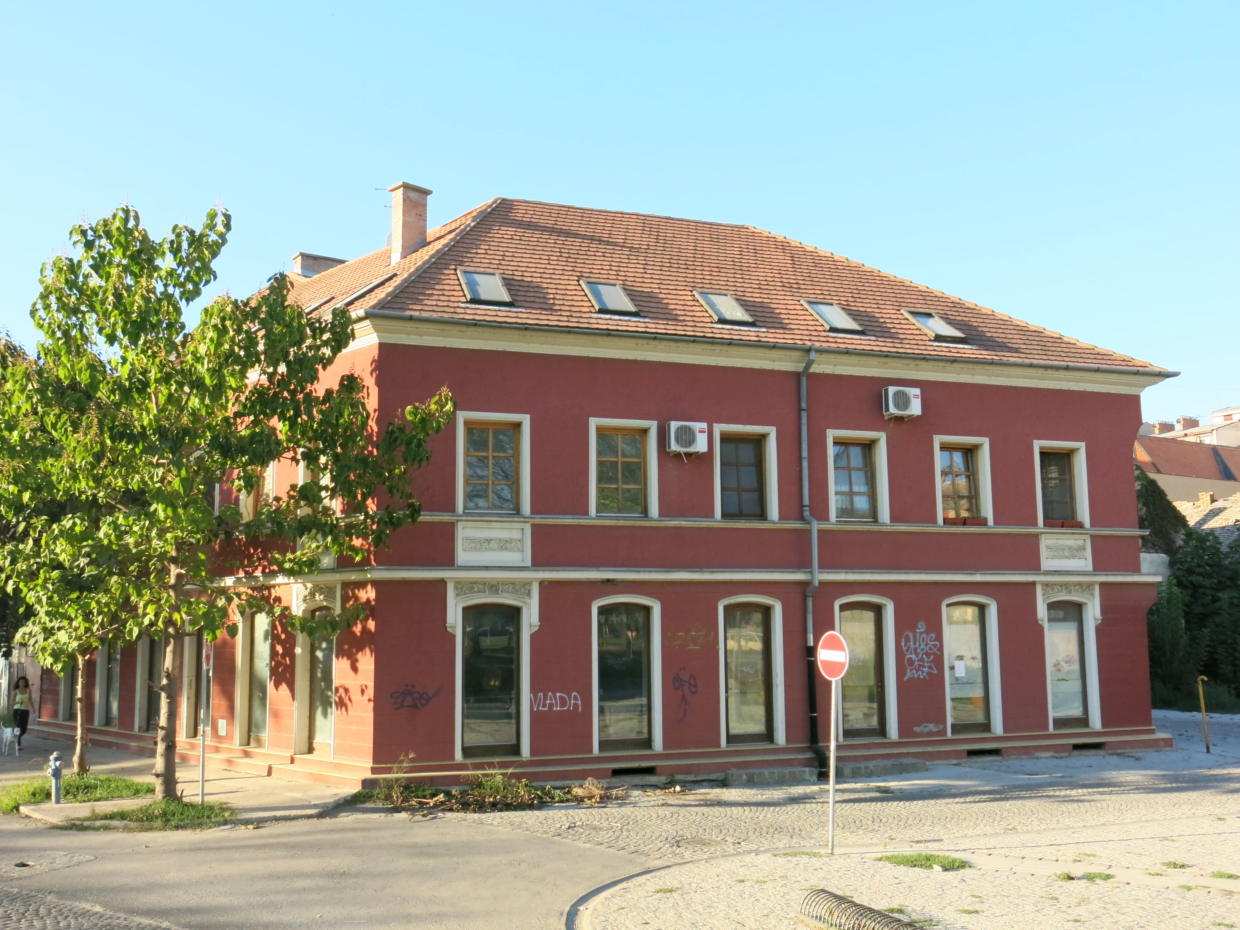 Зграда „Крагујевац“ у Панчеву